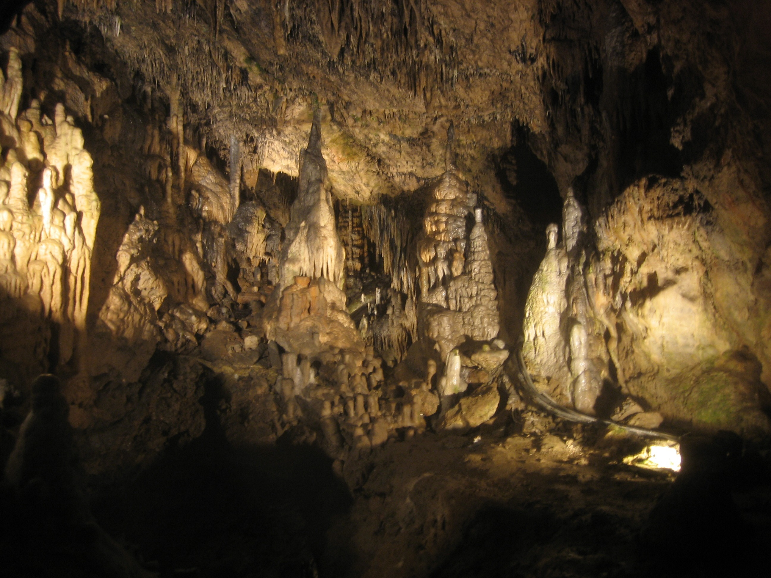 Grotten van Han Han - Belgium